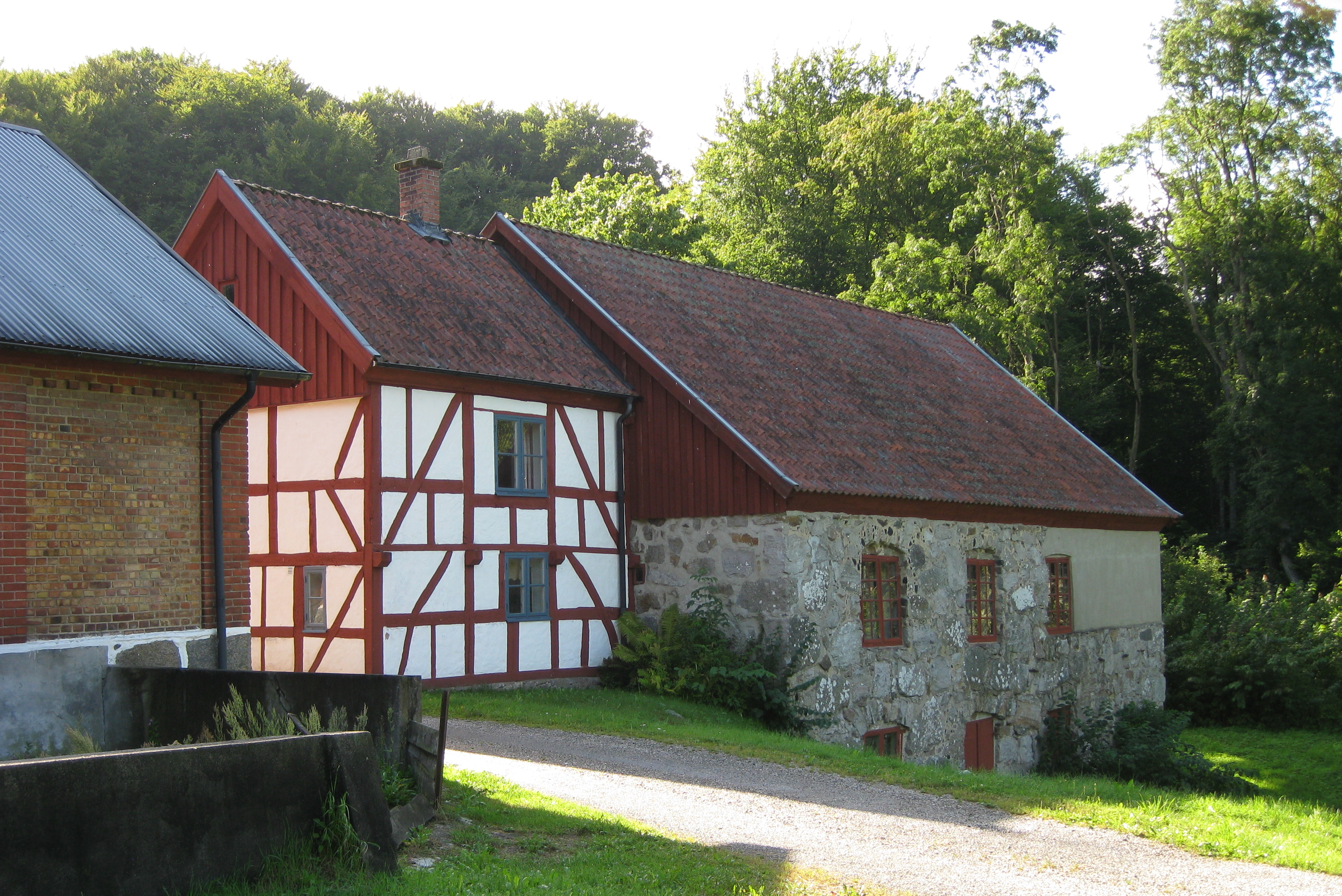 Sträntemölla i Simrishamns kommun